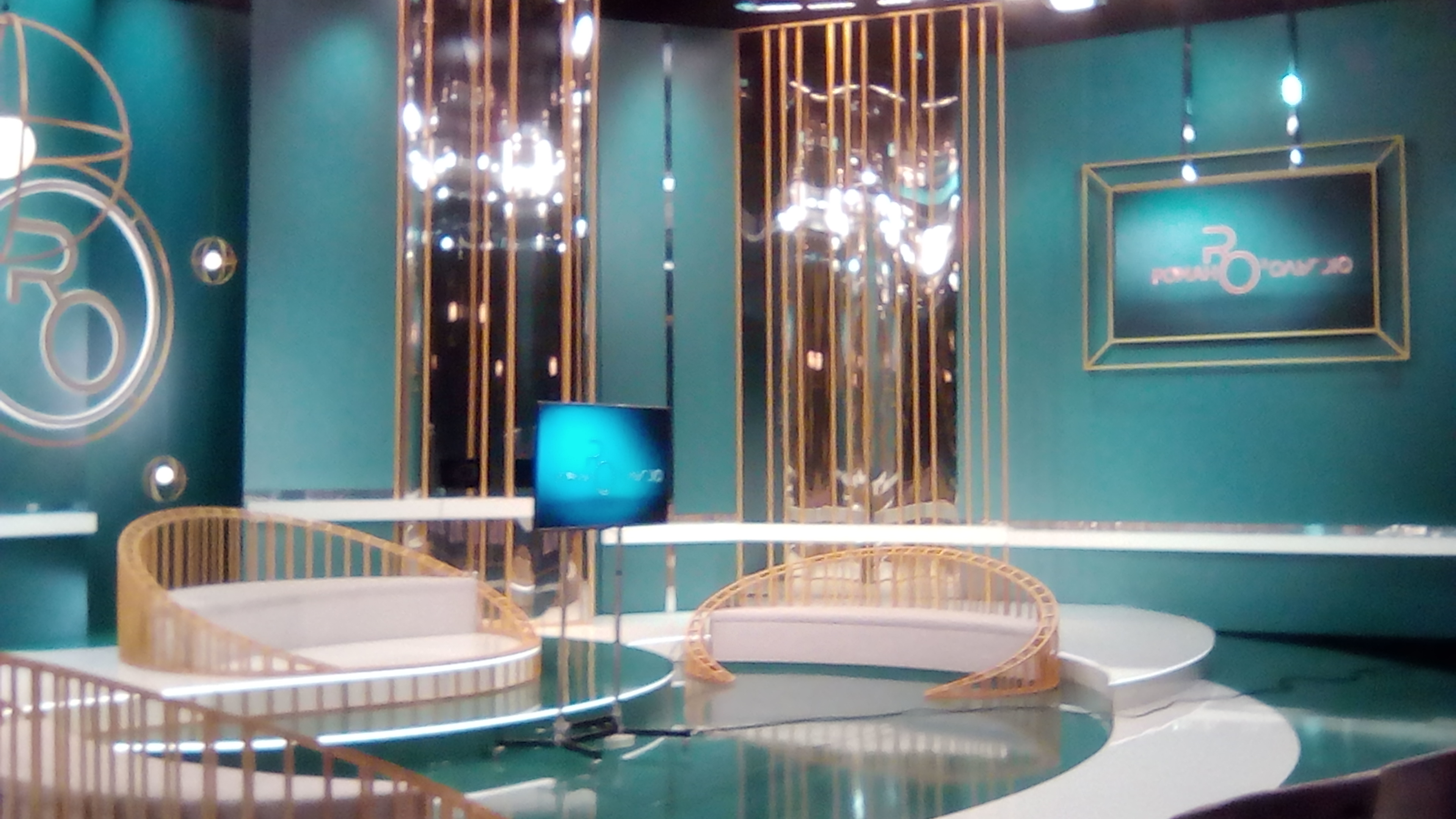 Шоу на Интере